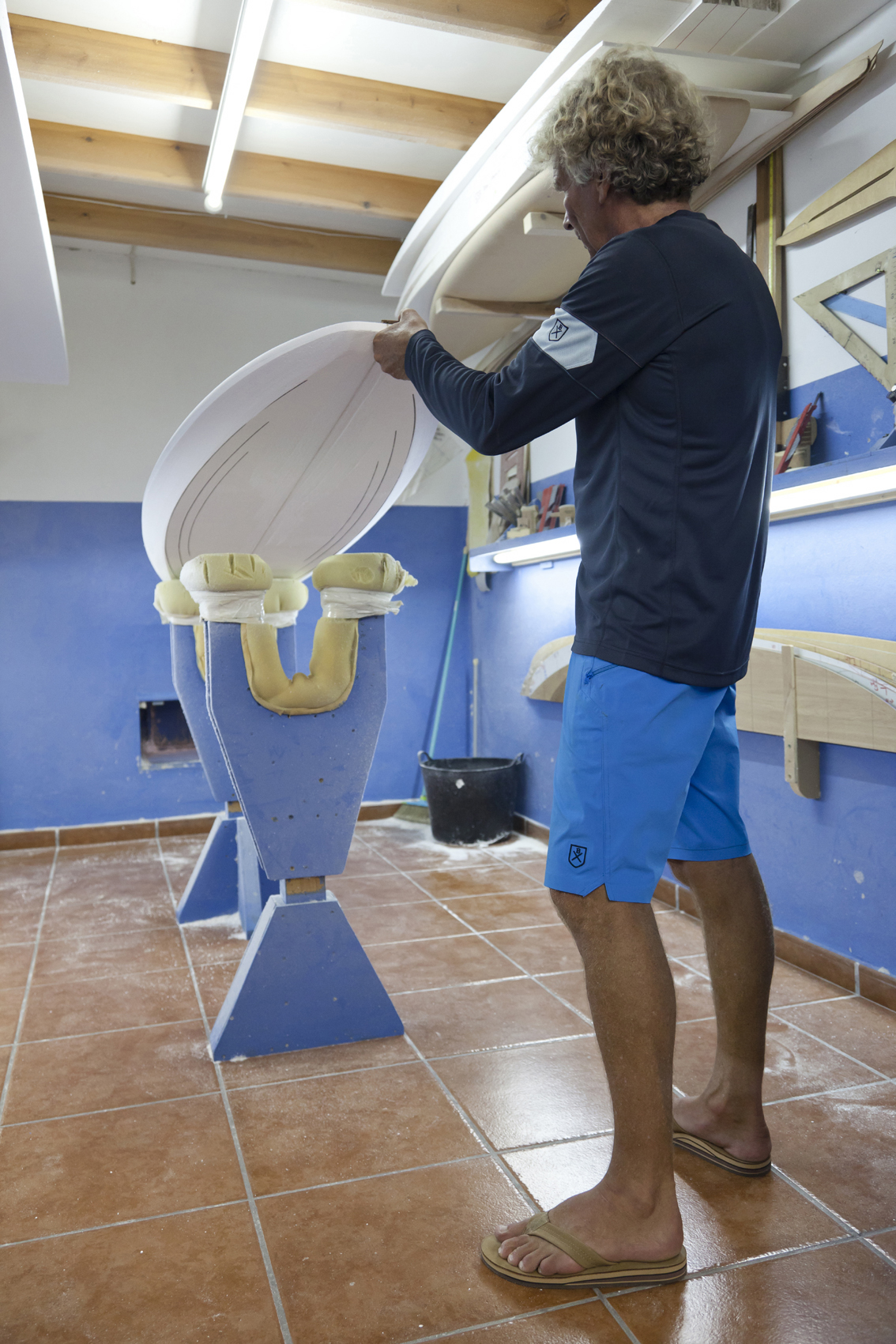 In der Werkstatt auf Fuerte beim Shapen 2012